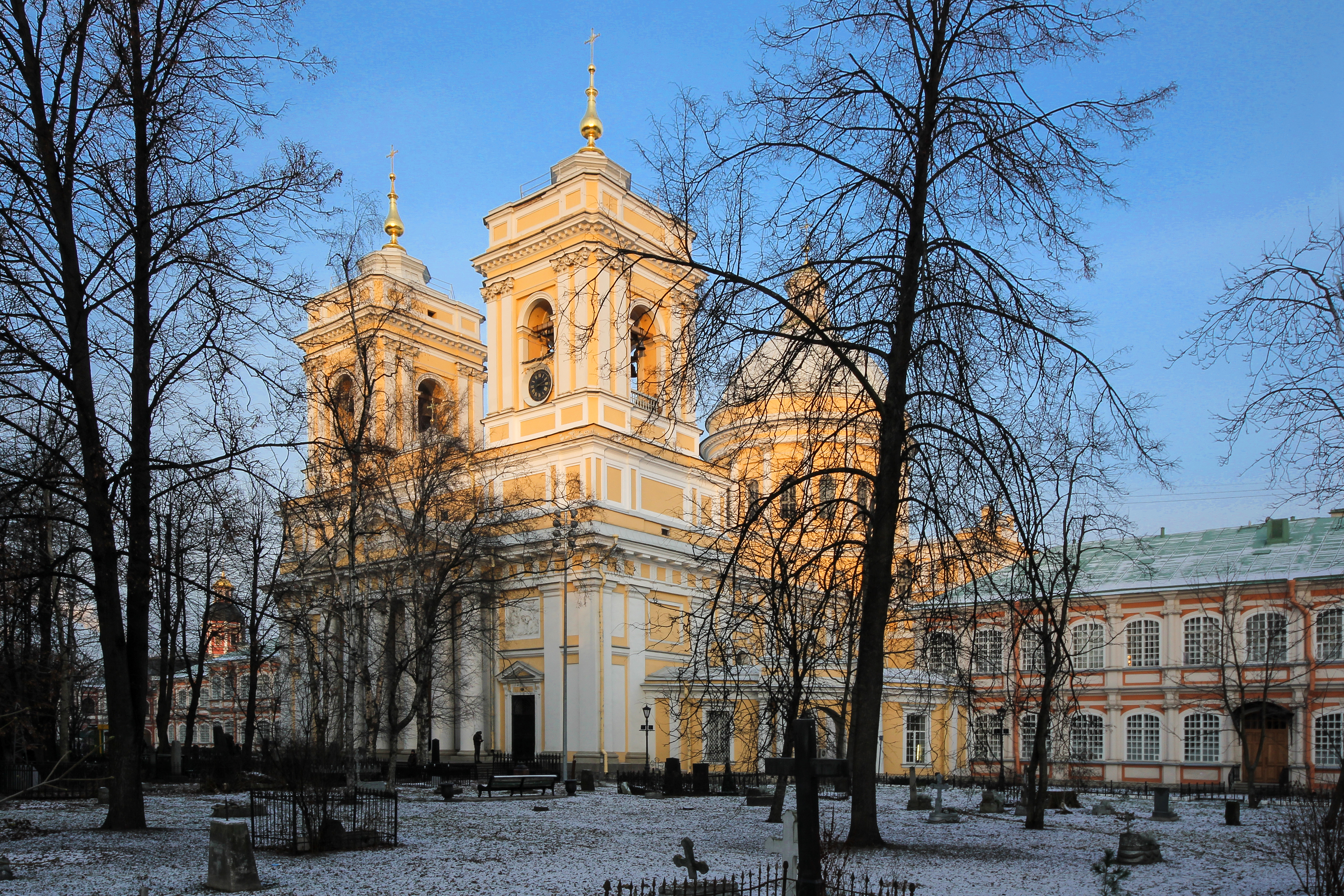 Троицкий собор с двумя соединительными флигелями: набережная р. Монастырки, 1, Центральный район, Санкт-Петербург